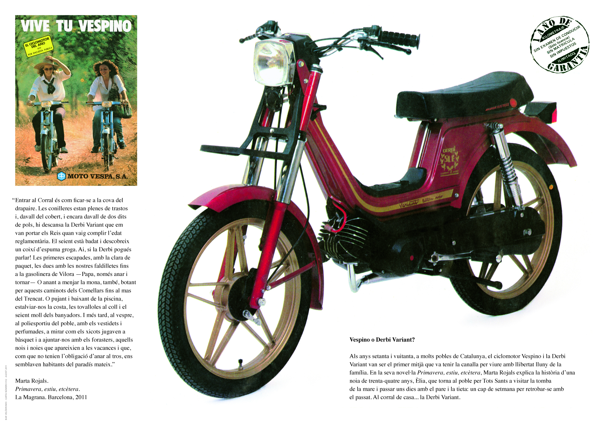 La novel•la de Marta Rojals Primavera, estiu, etcètera (2011) ha estat un de les revelacions de la temporada literària. Explica la història d'una dona de trenta-quatre anys que torna al poble dels pares, a la Ribera d'Ebre. Al corral de casa, sota dos dits de pols, troba la moto de les primeres escapades al poliesportiu i a la piscina, amb les amigues. Vespino o Derbi Variant, símbol de la llibertat dels catorze anys.